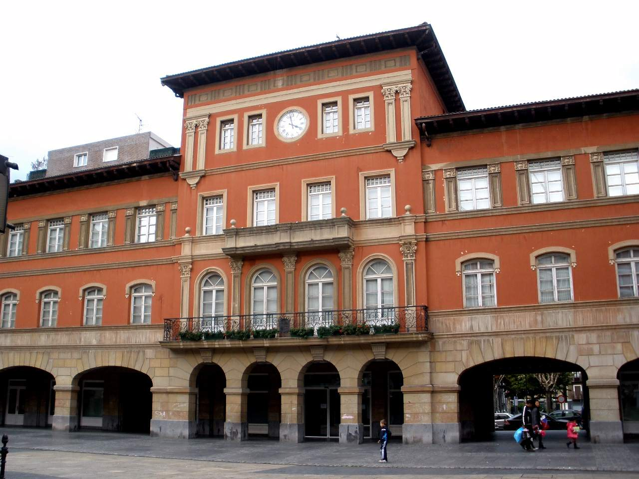 Erandio - Ayuntamiento